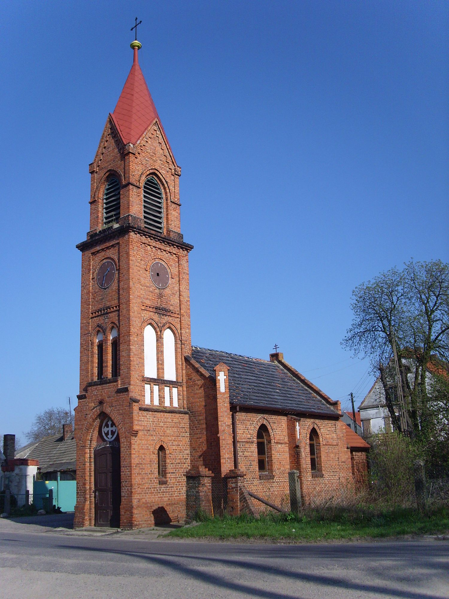 Szczyglice - kaplica Narodzenia Najświętszej Marii Panny 04.06.